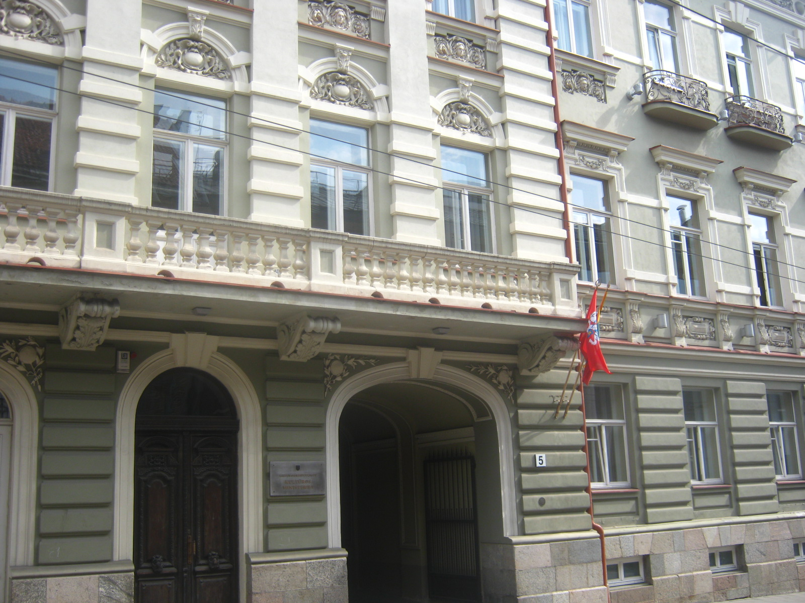 Vilnius